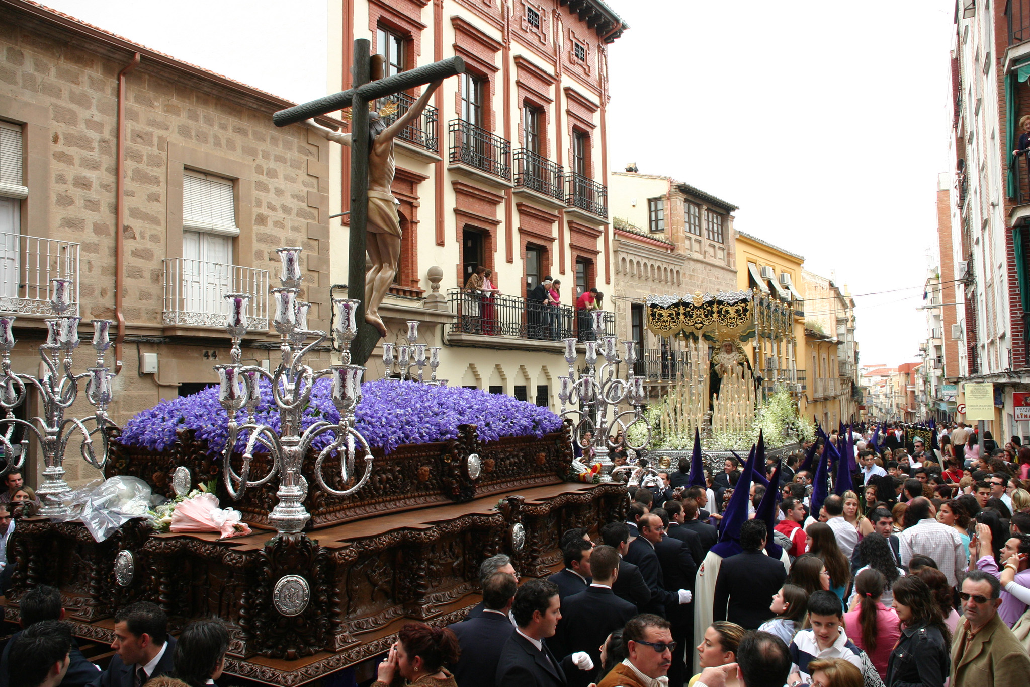 Expiración en la calle Marqués, Linares.